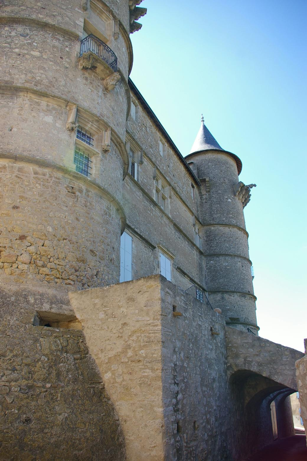 Château de Margon, Margon, Hérault, France.